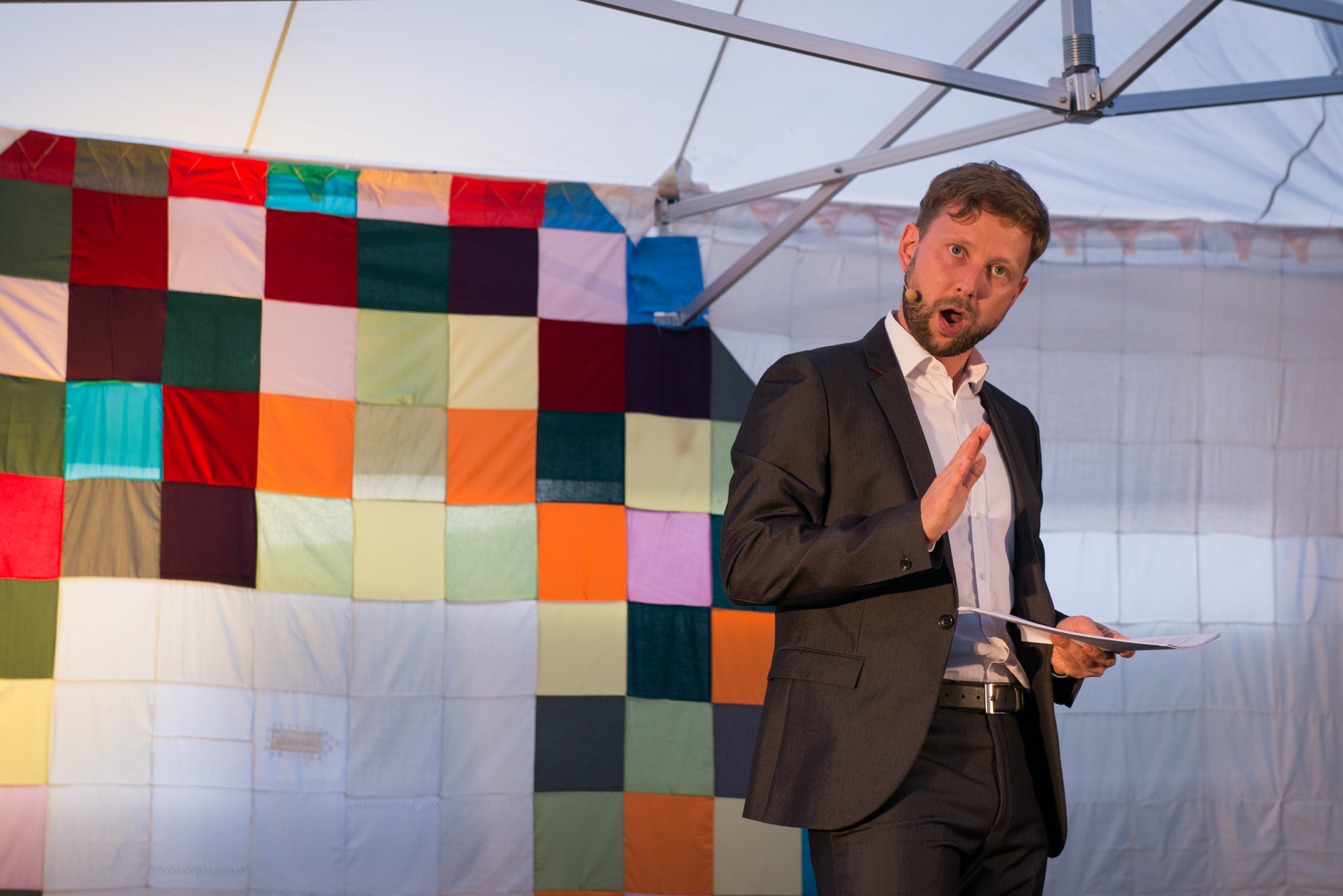 Jaak Prints, "24 aastat ühe tunniga", Orulava.